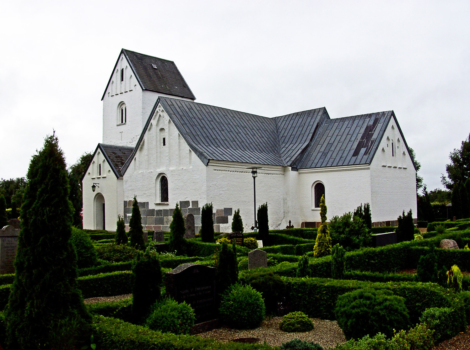 fra sydøst